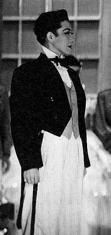 「君の名は」舞台写真より、春日野八千代（Kasugano Yachiyo）